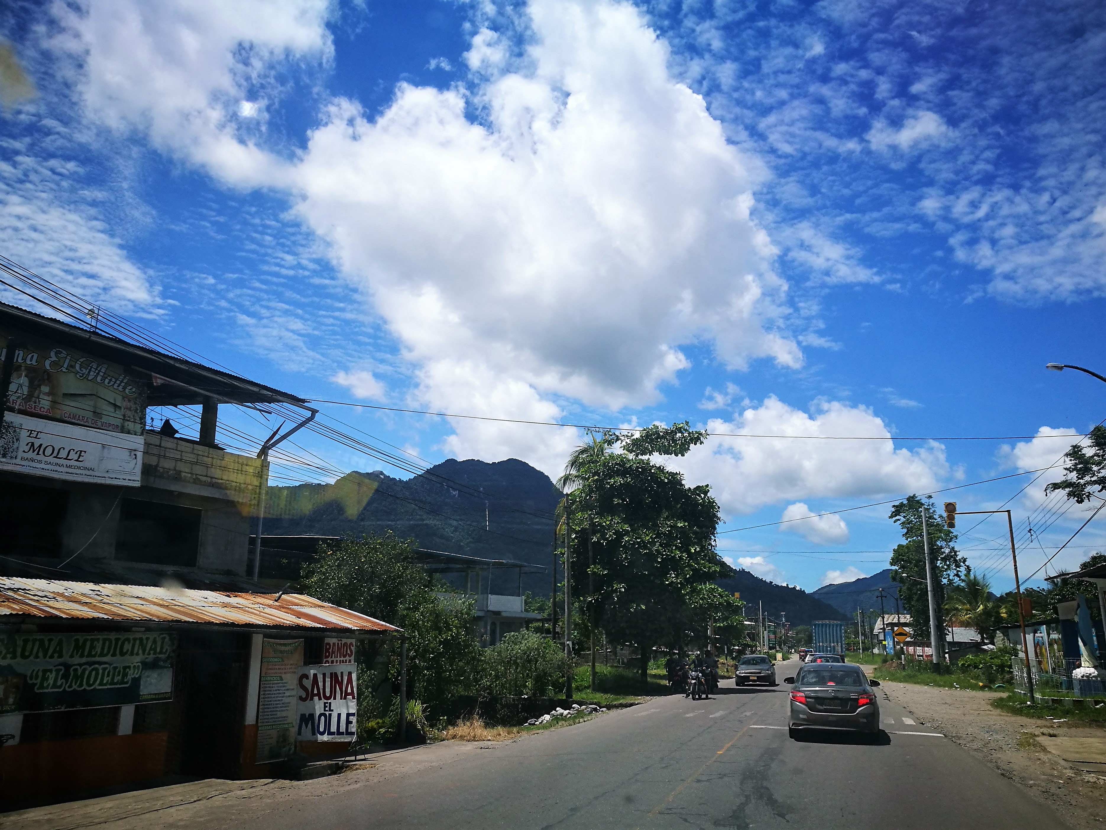 Carretera 18 A al districte Mariano Dámaso Beraún, Huánuco